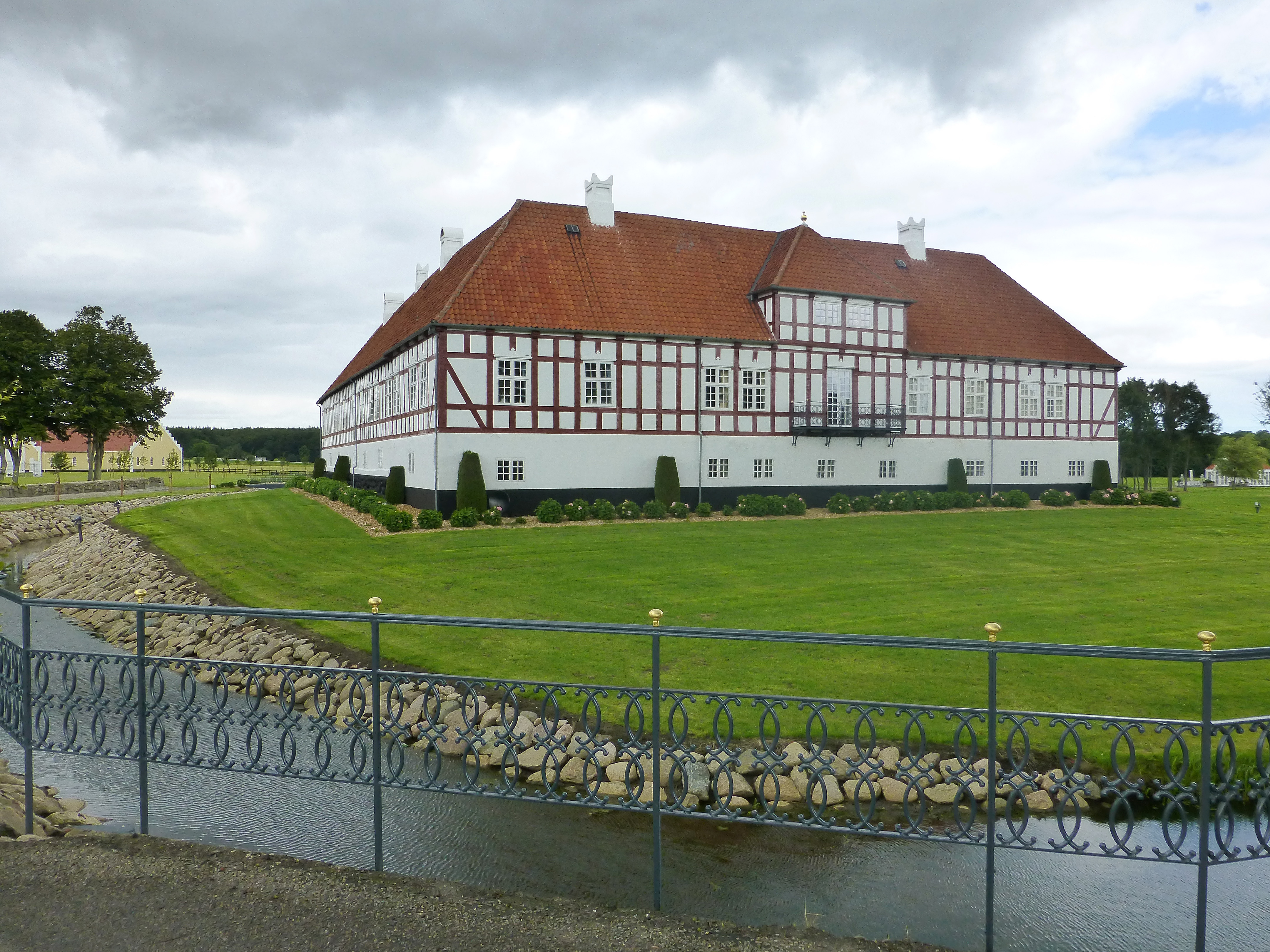 Åkær set fra sydøst